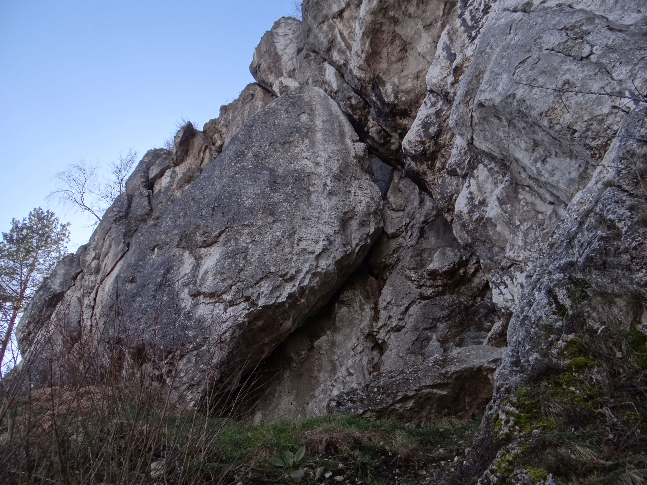 Kula w Dolinie Kobylańskiej